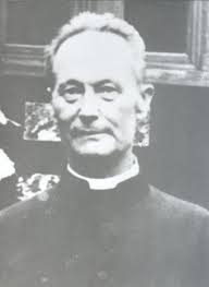 Páter Arnošt Jureczka (6. března 1867 Hlučín - 26. duben 1945 Sudice)